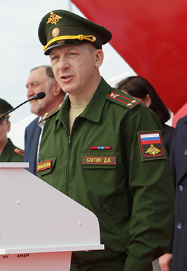 Подполковник Вооруженных Сил РФ Дмитрий Саутин